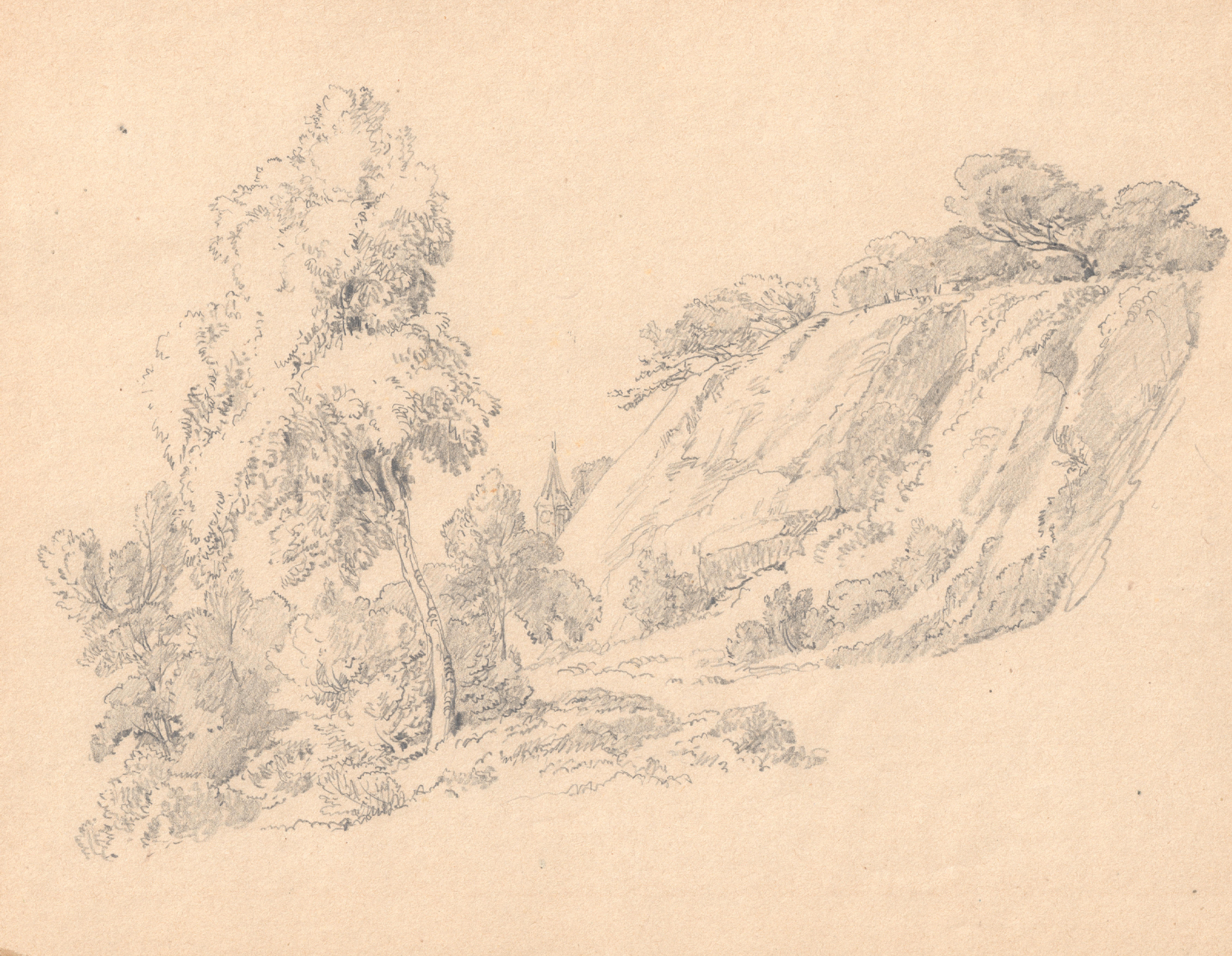 Studie Bleistift von Elisabeth Kelly 1825-1890)